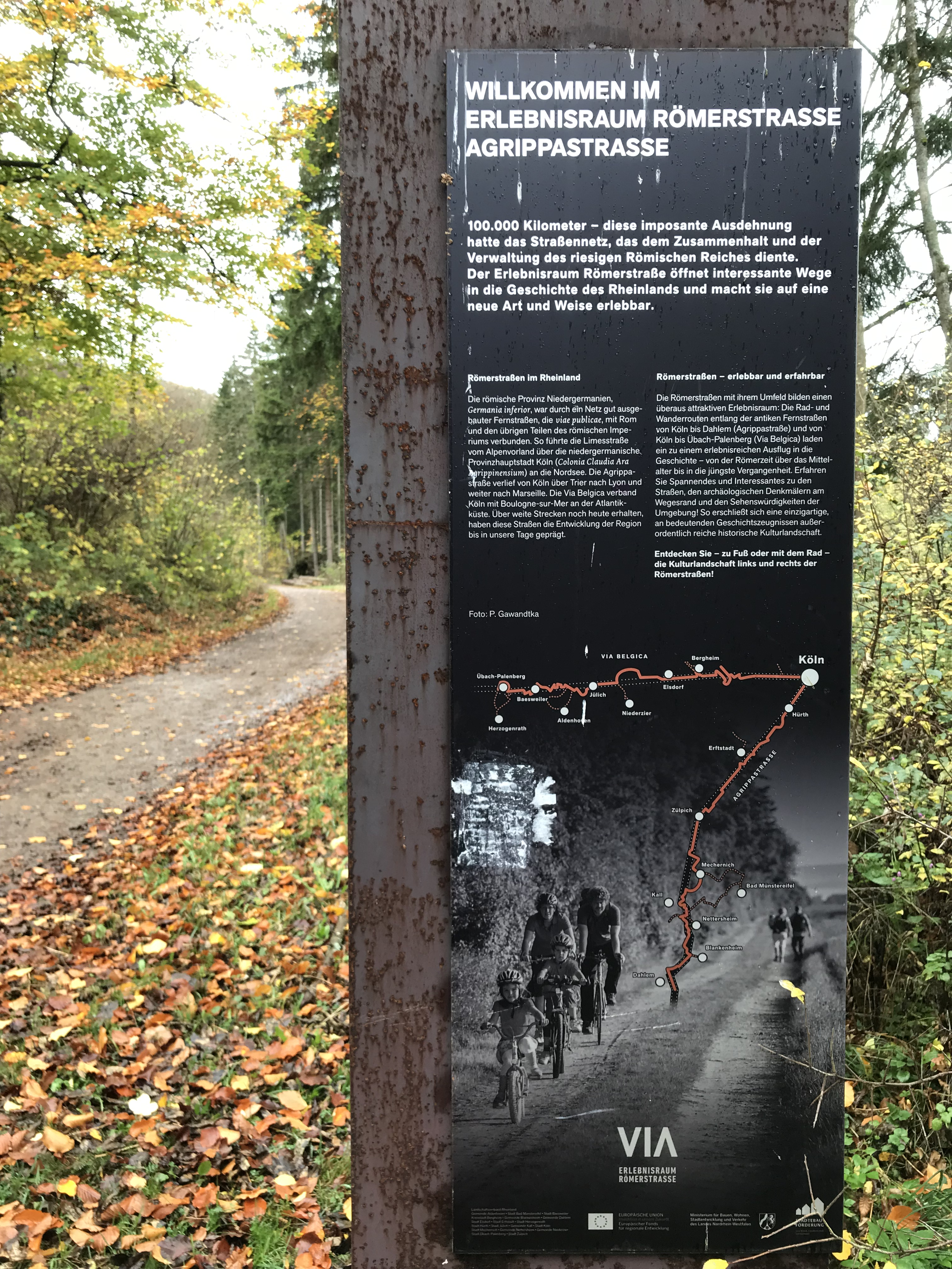 Infoschild Römerstraße Agrippastrasse vom VIA Erlebnisraum Römerstraße